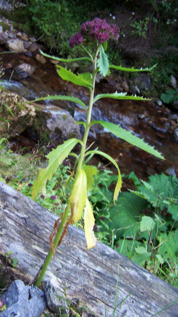 Sedum fabaria (pl. rozchodnik karpacki), habitat: Tatra Mountains, Ciemniak, Czerwone Żlebki